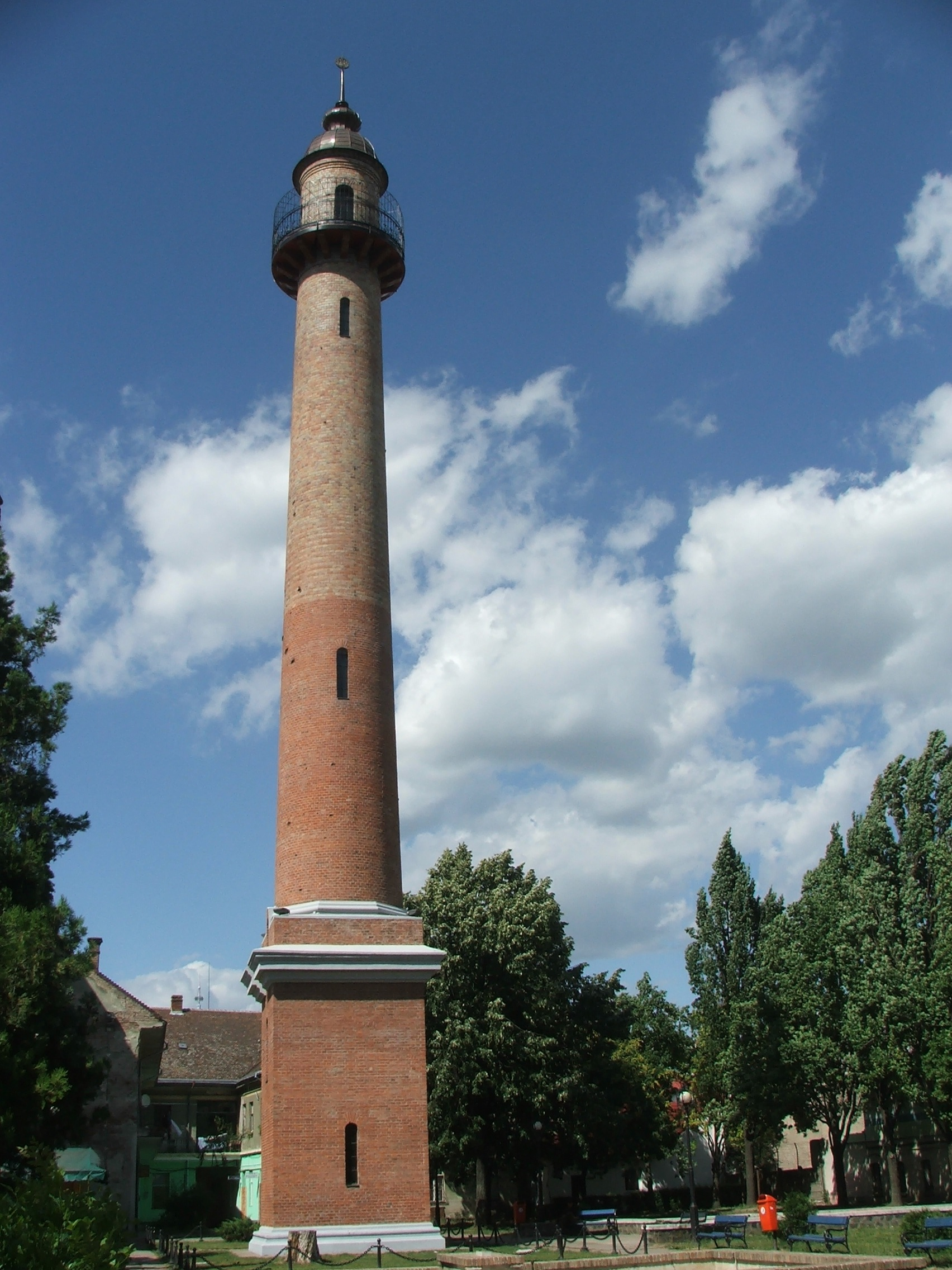 Szatmárnémeti, Tűzoltó-torony